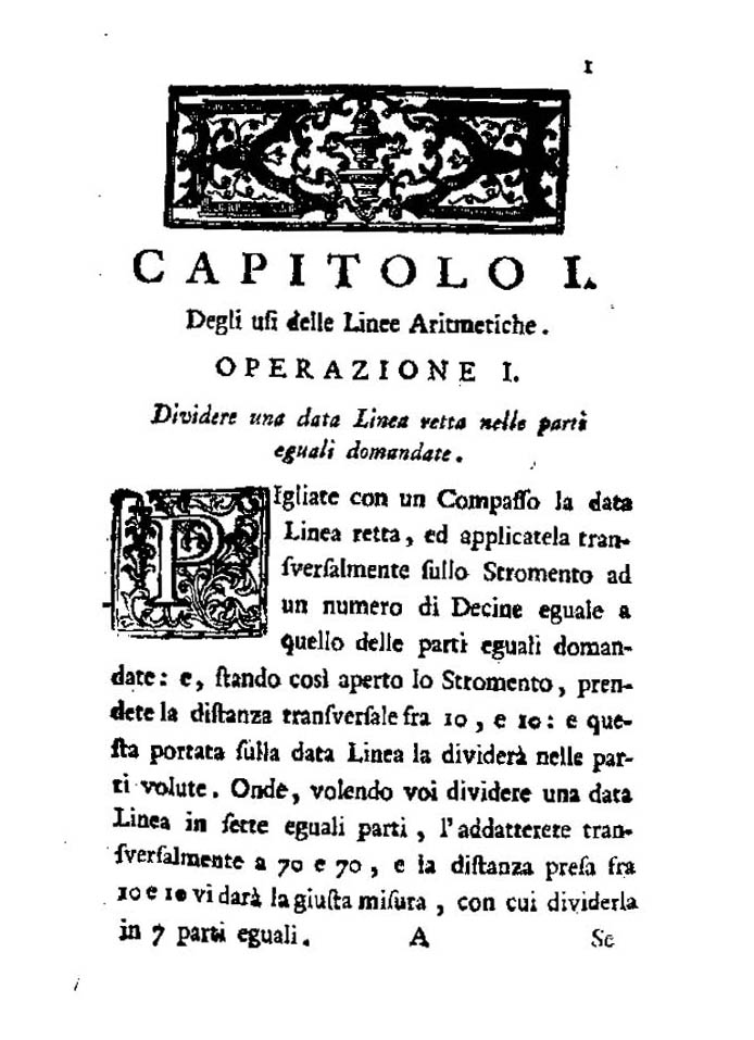 Trattato del compasso di proporzione composto da Giovanni Marchelli della Compagnia di Gesu ad istruzione de' signori convittori del Collegio de' Nobili di Milano e dedicato a s.e. il signor marchese Giacomo Maria Brignole. - In Milano : per Giuseppe Galleazzi, 1759. - [2], XXII, 352, [16] p., [1] c. di tav. ripiegata : ill. calcografiche ; 8º .